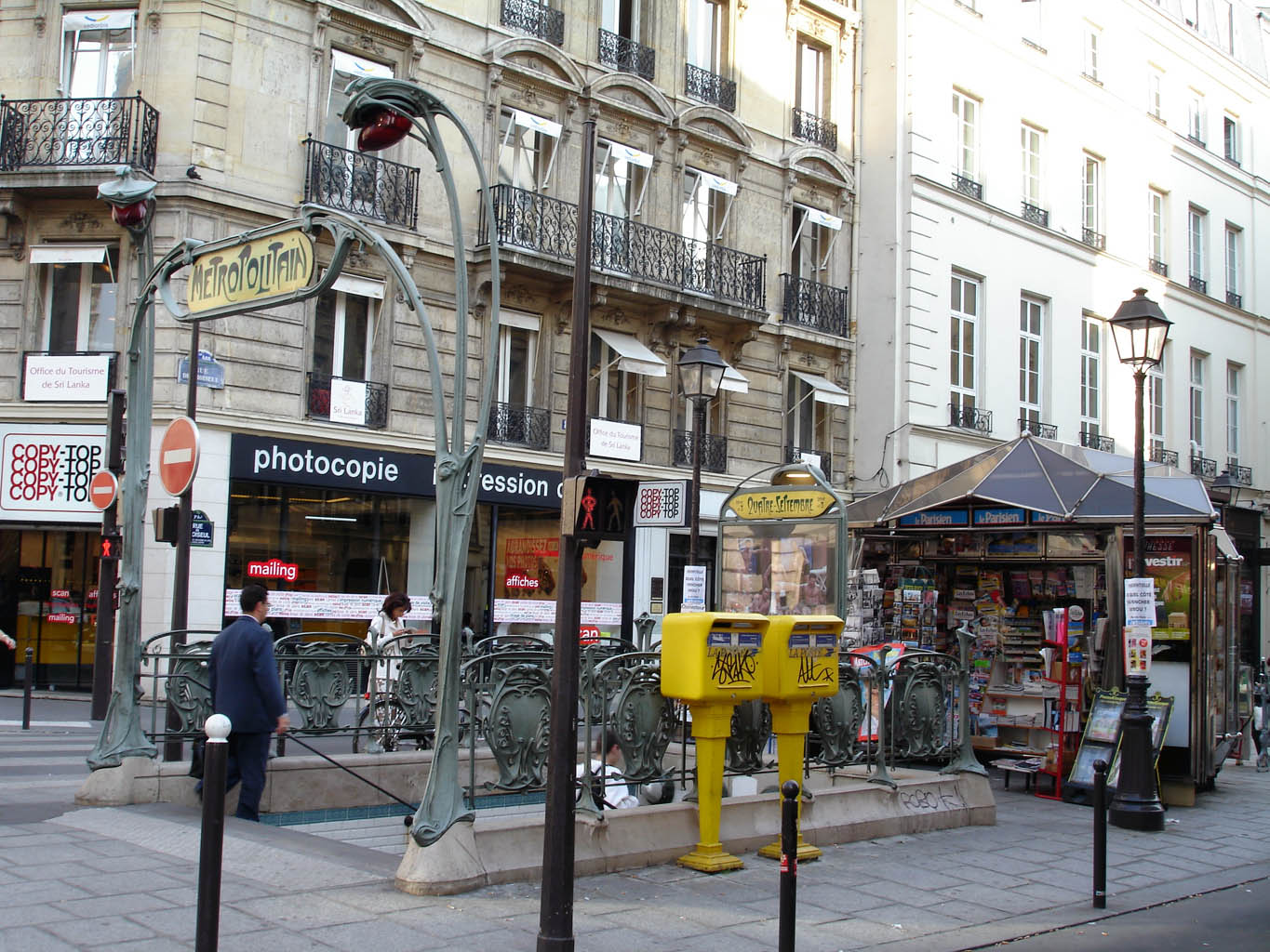 Métro de Paris - ligne 3 - Station Quatre-Septembre (France)